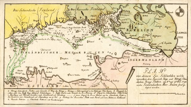 Scan from Johann Christoph Brotze's book Sammlung verschiedner Liefländischer Monumente. Plan von denen See-Schlachten welche zwischen den Russisch Kays. und Königl. Schwedischen Kriegs Flotten am 3 ten und 9 ten Jul. 1790 in den Finländischen Meer-Busen sind geliefert worden [die Karte].